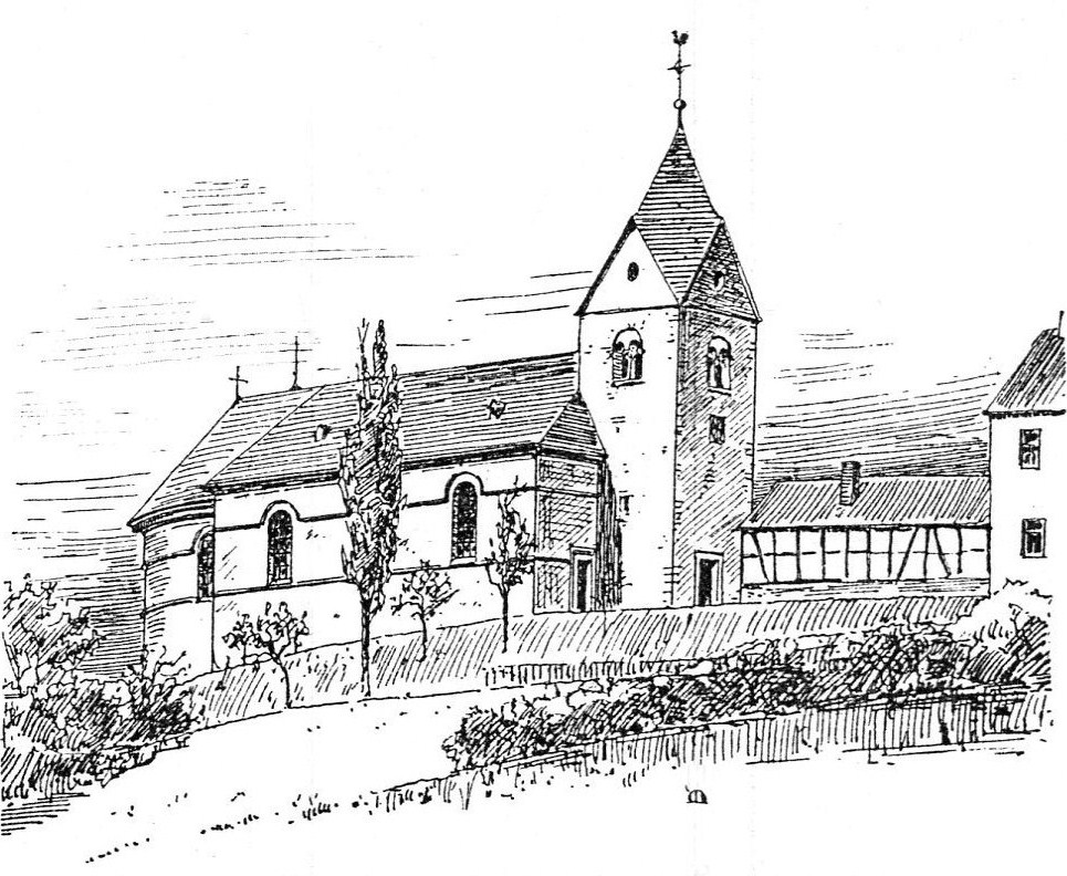 Ansicht der Pfarrkirche 1907, Aegidienberg